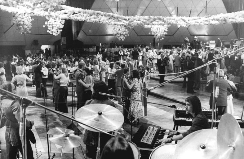 ADN-ZB Kohls 28.4.1976 Berlin: "Ball der Jugend" im Palast der Republik- Jugendliche aus allen Bezirken der DDR und der Hauptstadt trafen sich am 28.4.76 zu einem großen Ball in allen Räumen des Palastes der Republik ein, hier eine Tanzrunde im Großen Saal."